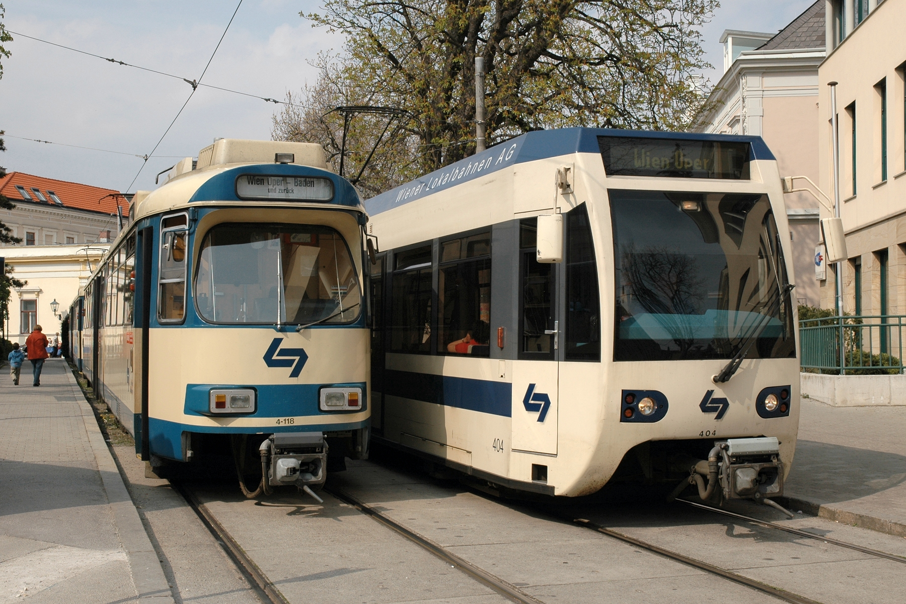 2 WLB-Züge in der Endstelle Baden-Josefsplatz